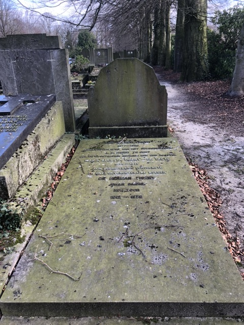 Graf Leo-Michel Thiery met vermelding van Herman Thiery, Johan Daisne wiens as later werd uitgestrooid.